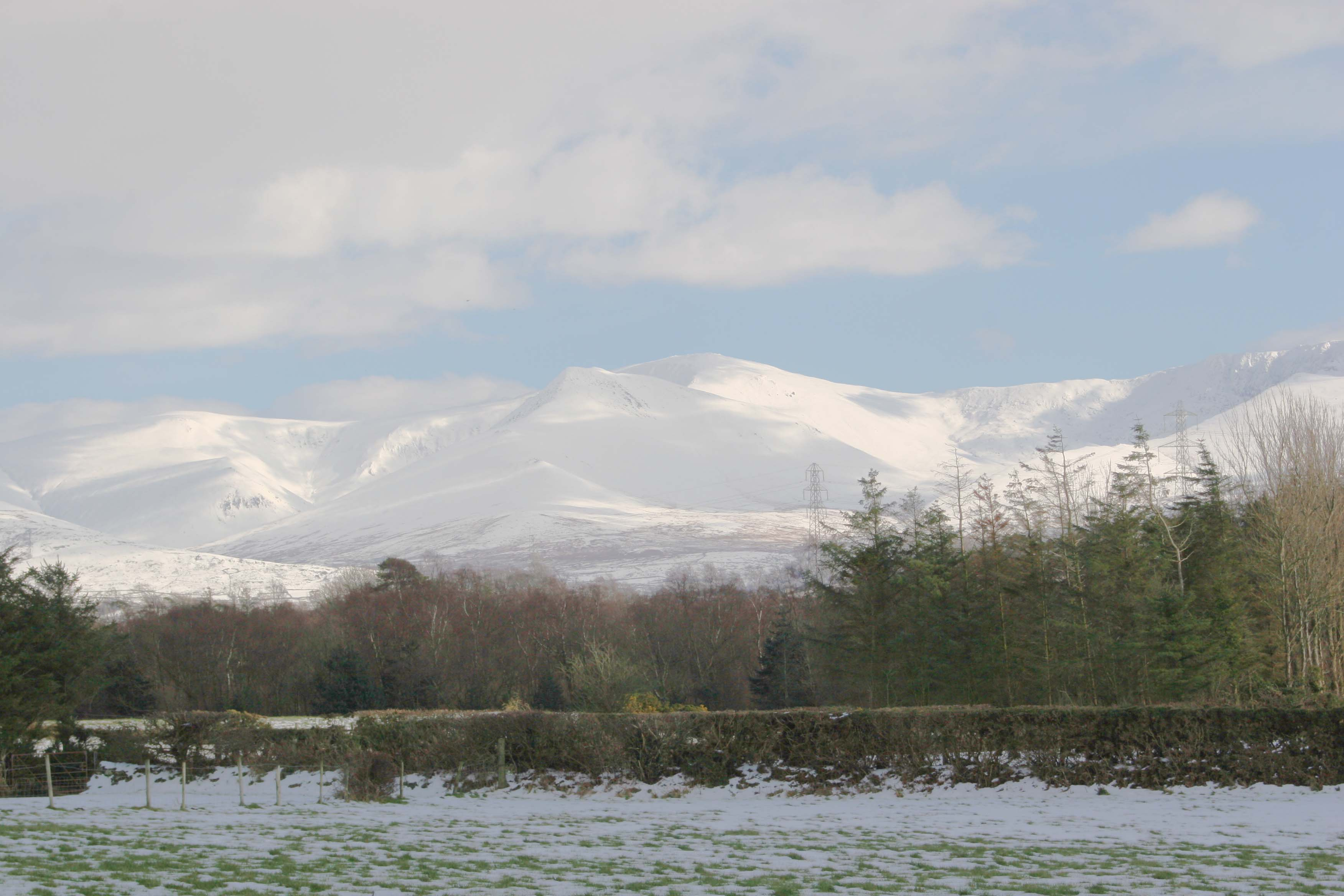 Carneddau range from Pentir Rhion Pritchard